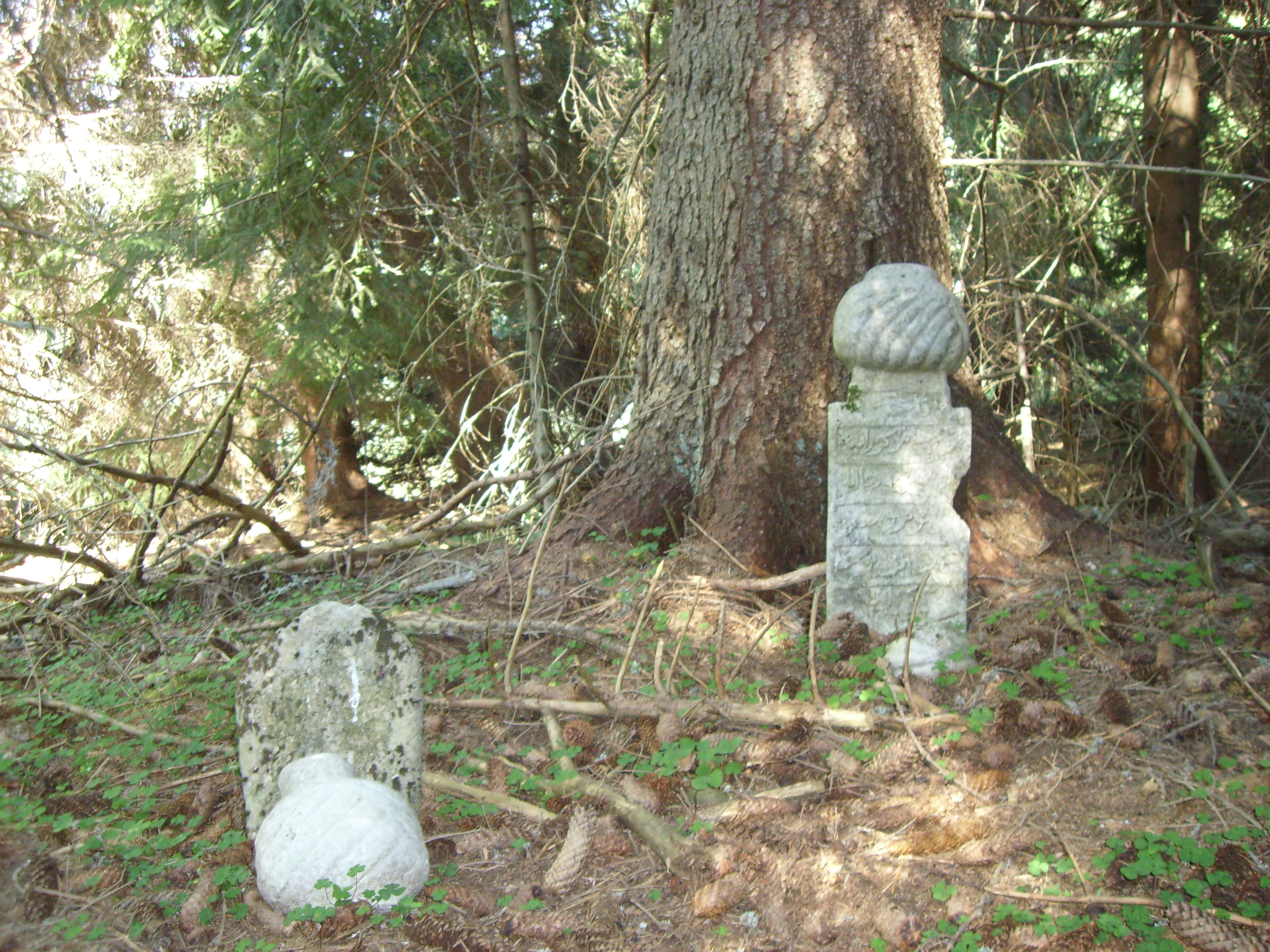 Останки от гробищен парк от опожареното и заличено село Тъмръш